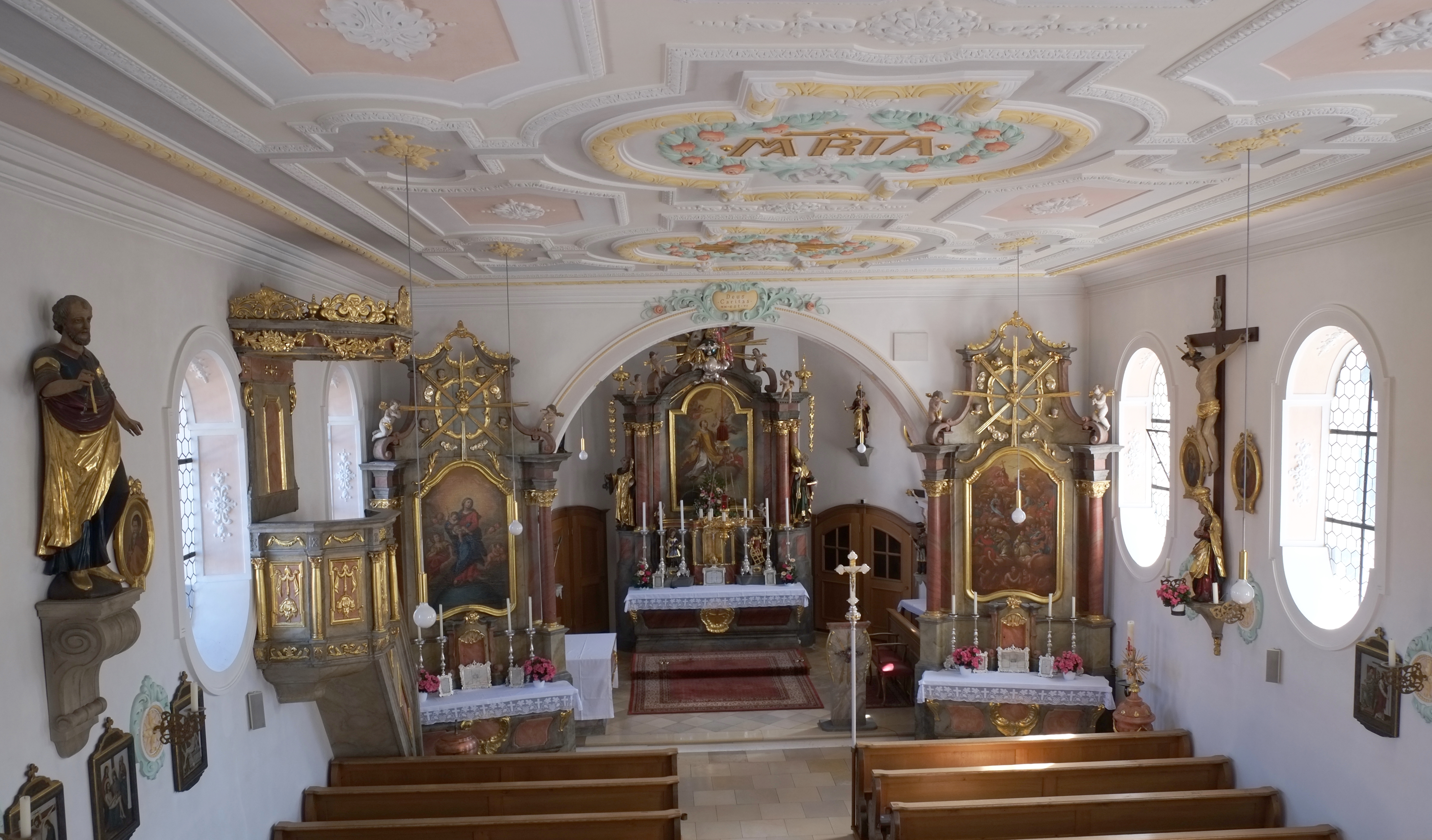 Kirche St. Stephan in Gallenbach, einem Stadtteil von Aichach im Landkreis Aichach-Friedberg (Bayern, Deutschland)